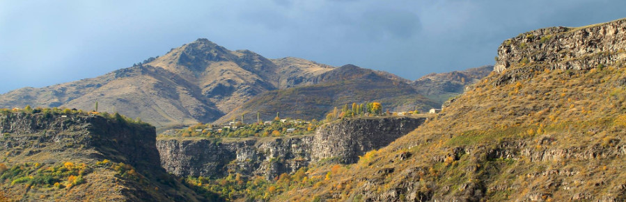 Աքորի